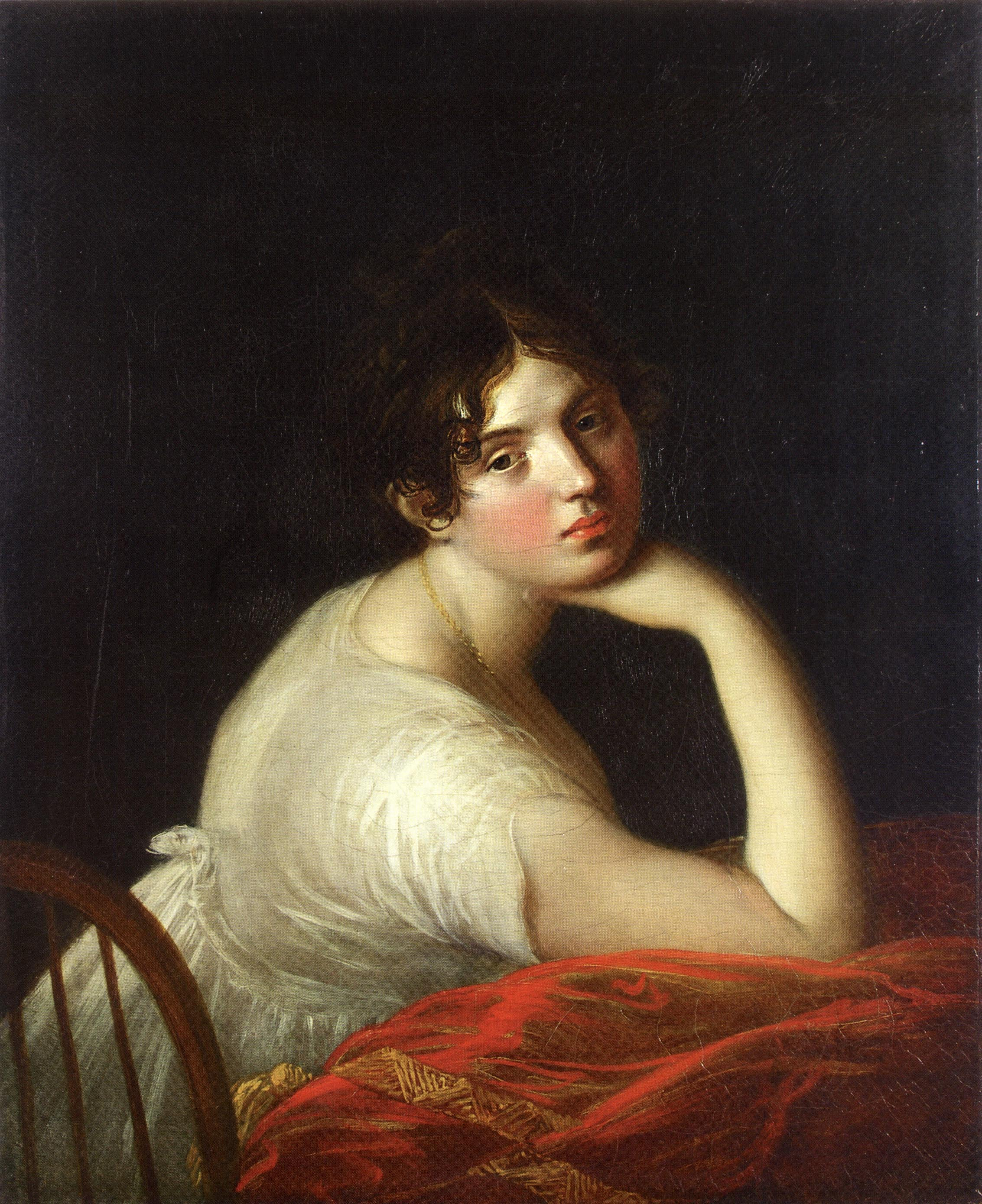 M.A. Naryshkina